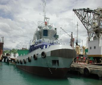 Remolcador Guaroa (RM-3) IMO number: 9313840